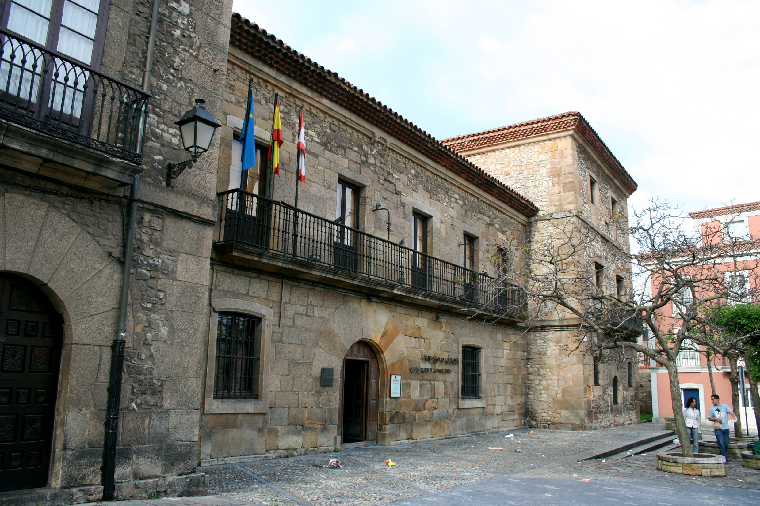 Museo casa natal Jovellanos en Gijón.